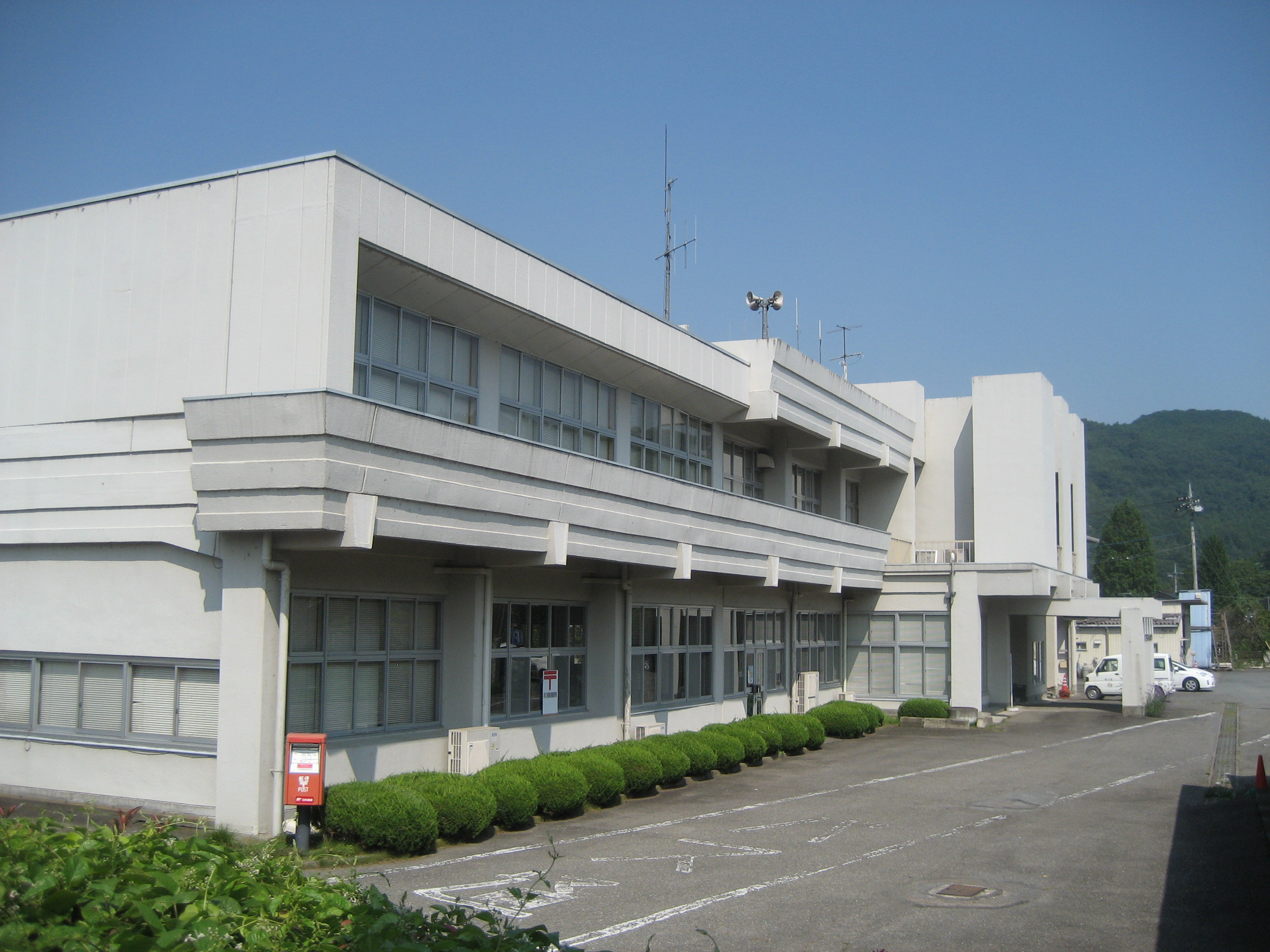 神川町役場神泉総合支所庁舎